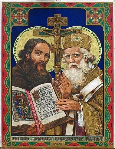 Jano Köhler - Cyril a Metoděj